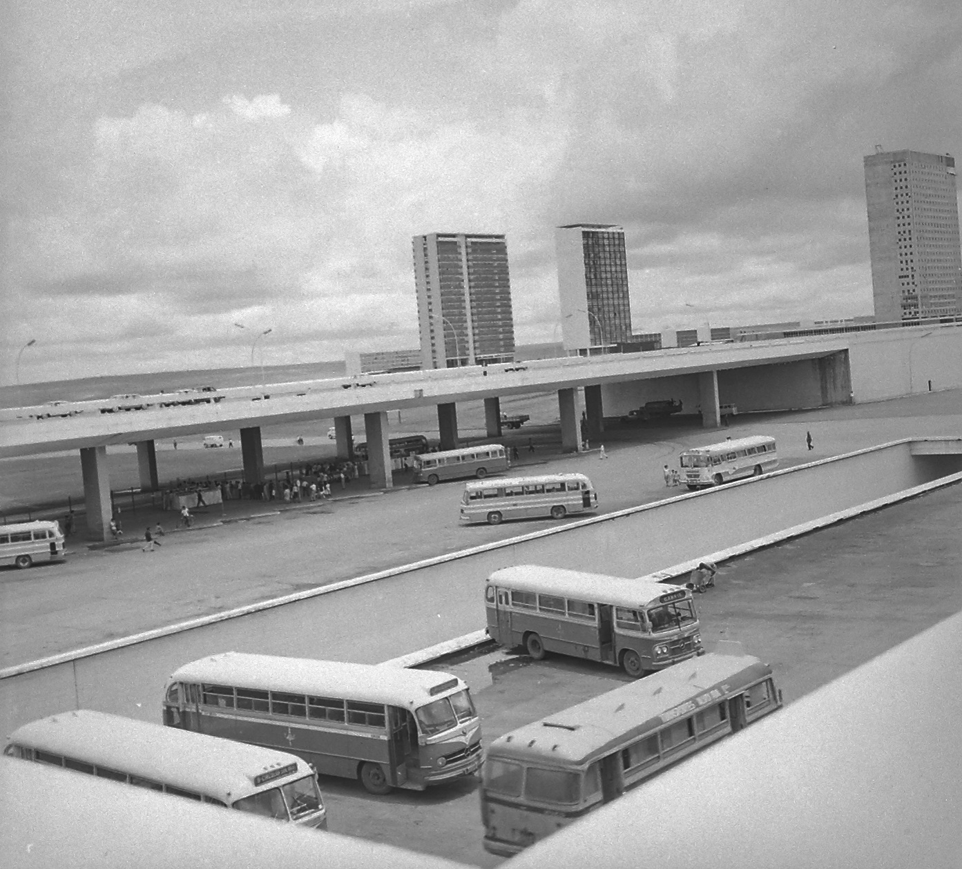 Imagem do Fundo Agência Nacional, do Arquivo Nacional